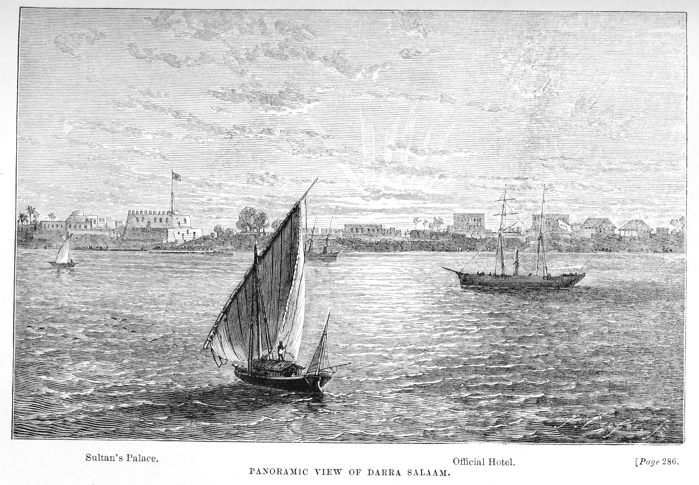 Dar es Salaam